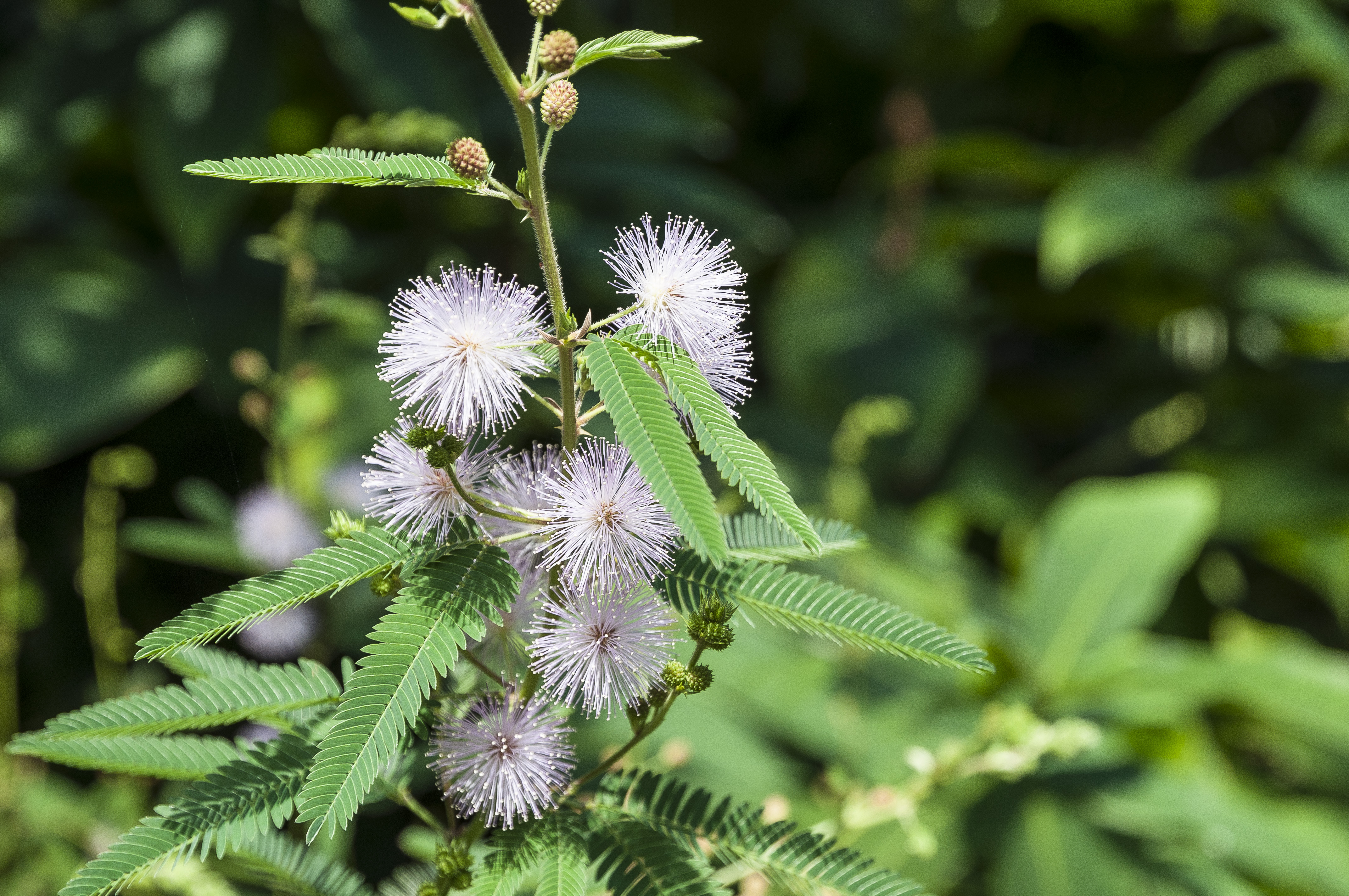 Le mimosa pudique (Mimosa pudica) est originaire d'Amérique tropicale et largement naturalisée à travers le monde.